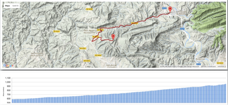 Altimetria de la carretera que Port de Sant Quirze de Besora fins a Els Munts